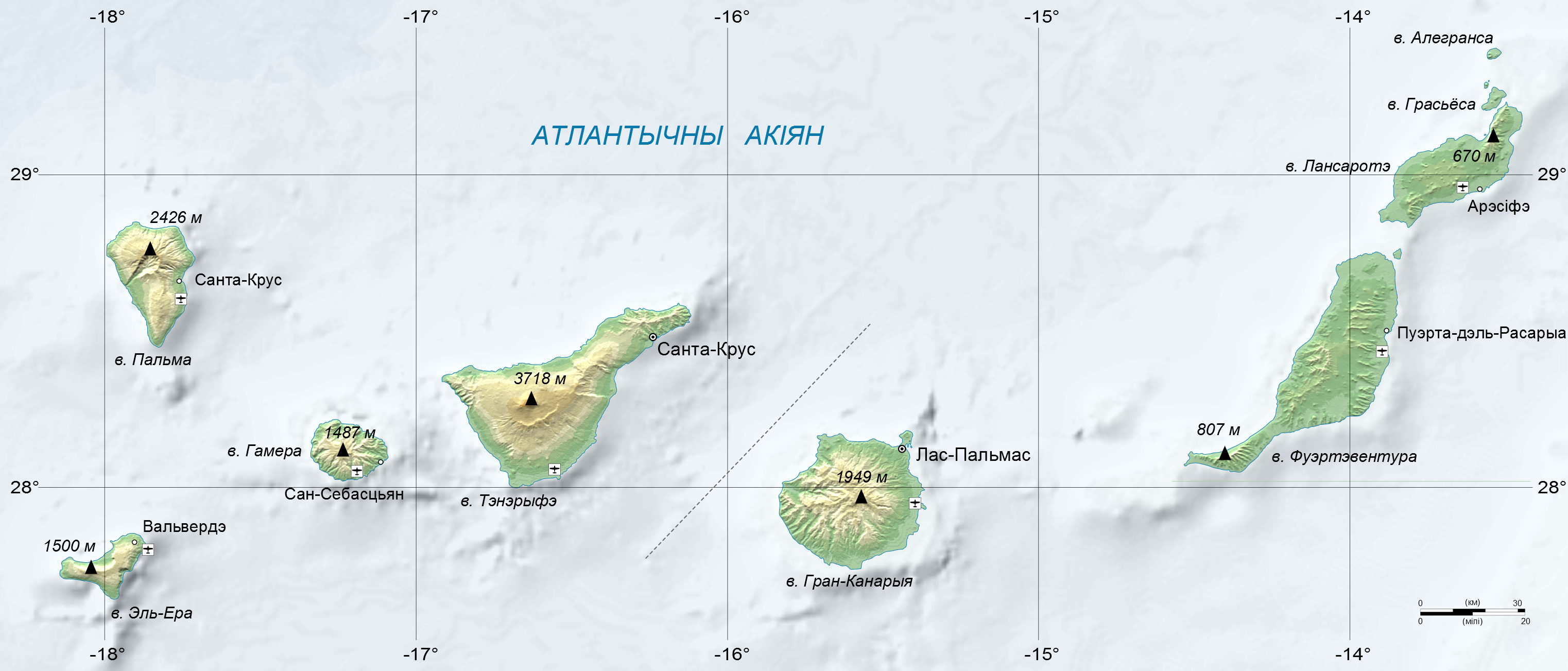 Карта Канарскіх астравоў